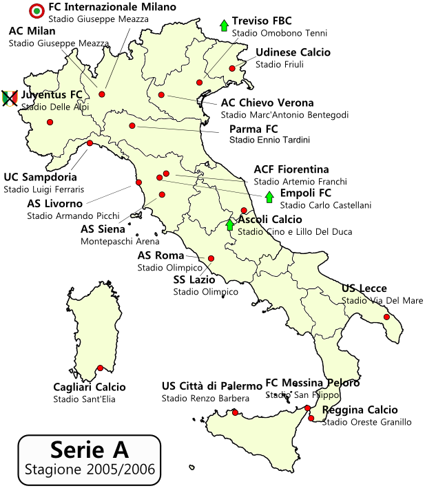 Distribuzione geografica squadre Serie A 2005-2006